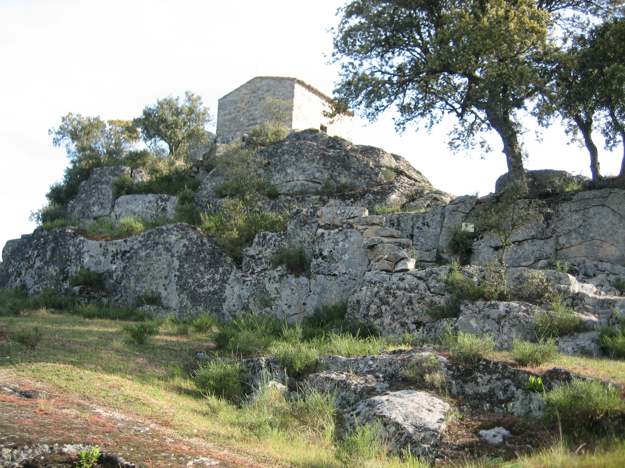 Hermita de San Cosme y San Damián, en Tudera –Zamora–.